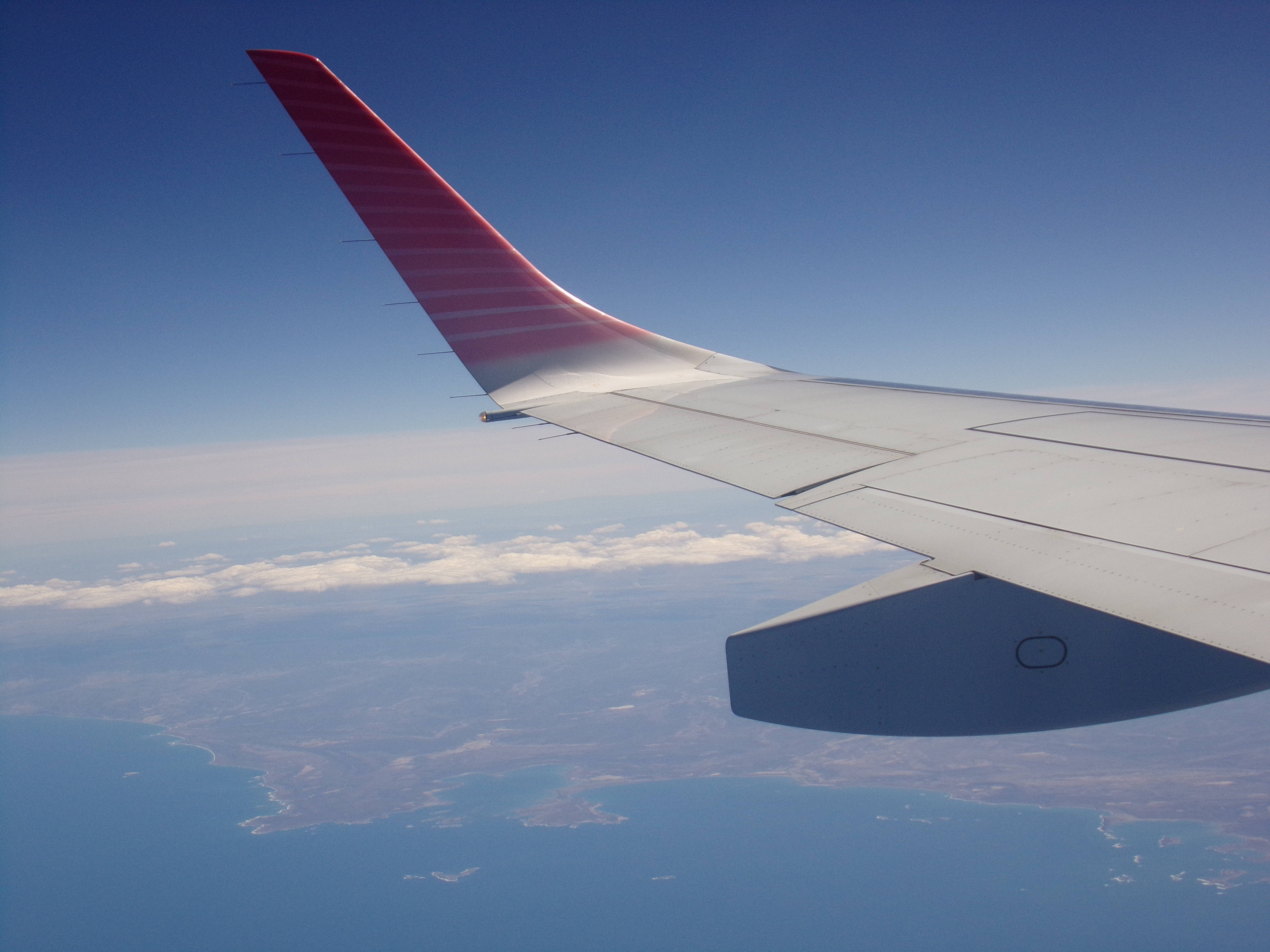 Área de Bahía Bustamante, Chubut - vista aérea